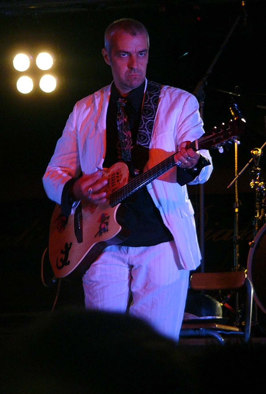 Davide Van de Sfroos in concerto a Omegna